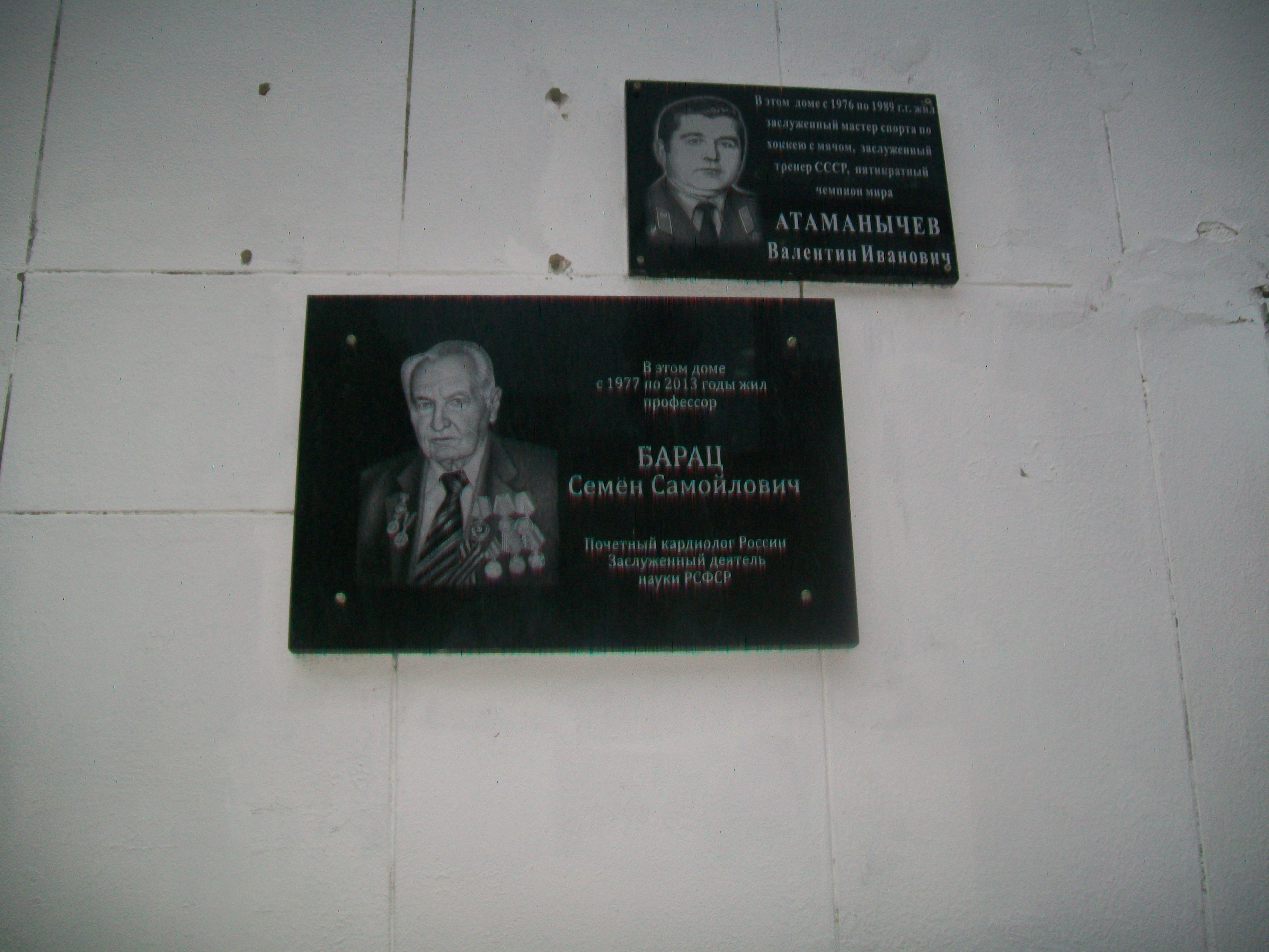 Мемориальные доски Семена Бараца и Валентина Атаманычева в Екатеринбурге . Дом Мамина-Сибиряка, 54. 27 сентября 2017 года